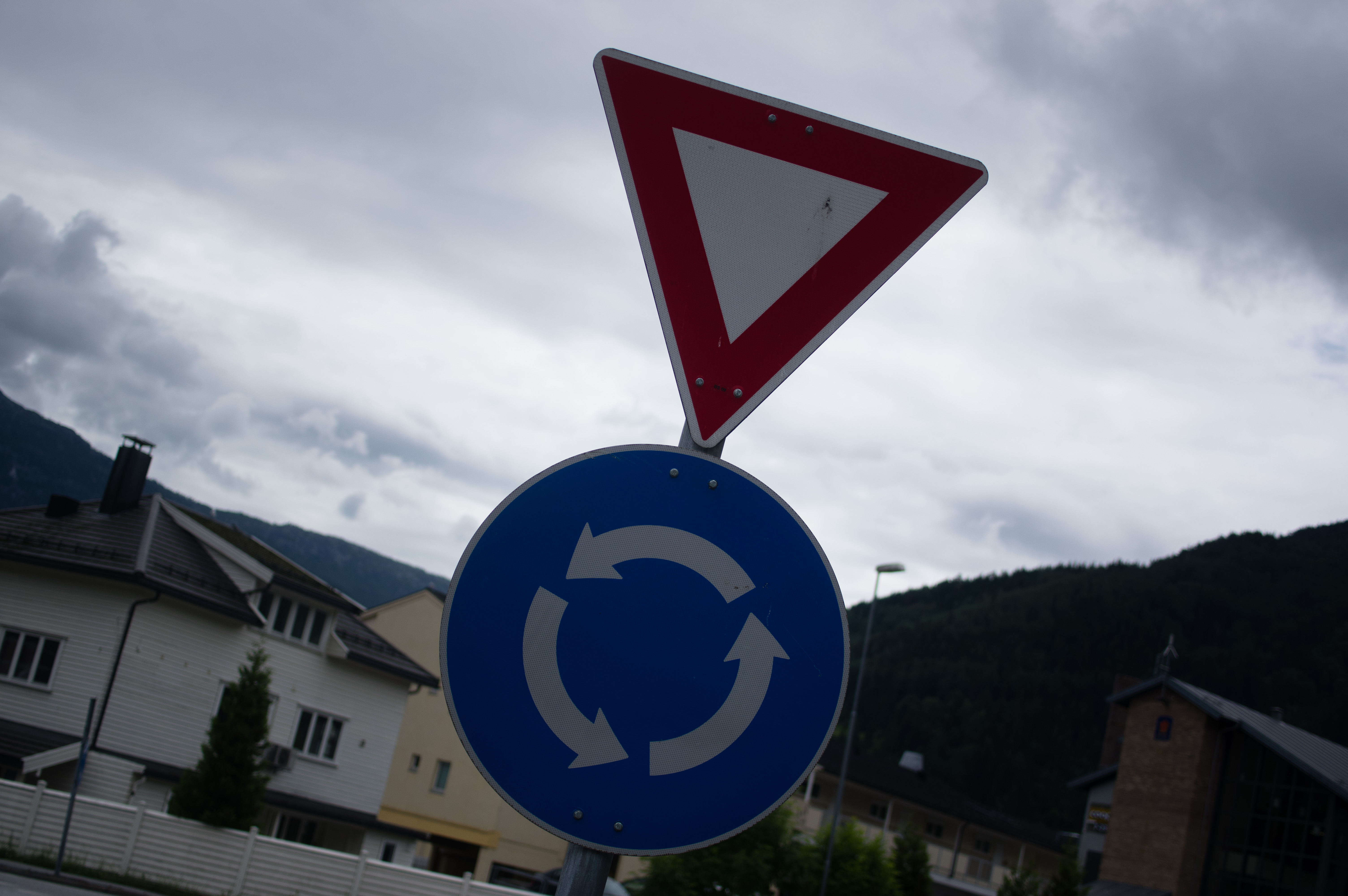 Rundkøyring, vikeplikt.